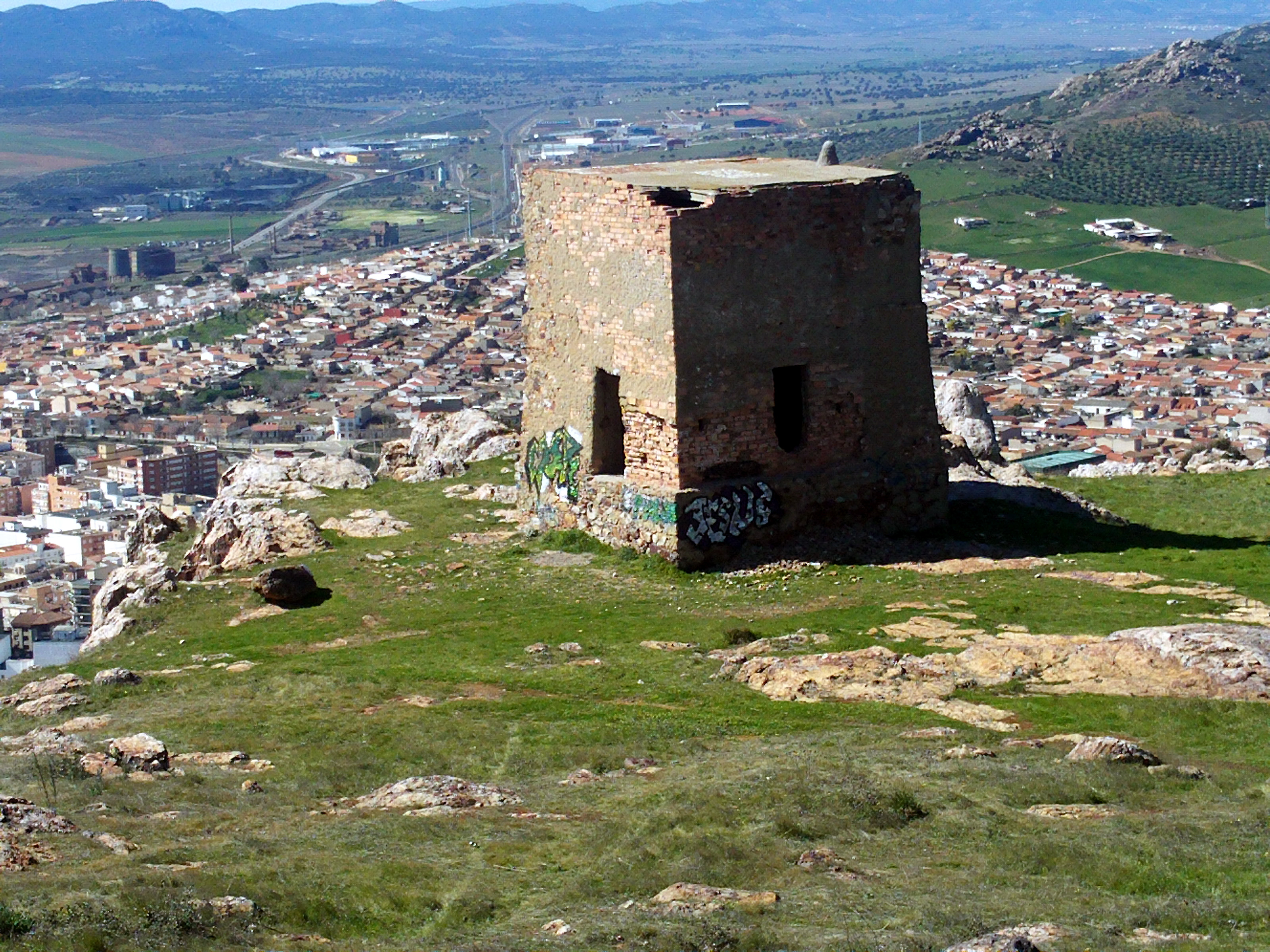 "Torre Mathé" tambien llamada "Chimenea Cuadrá" en Puertollano